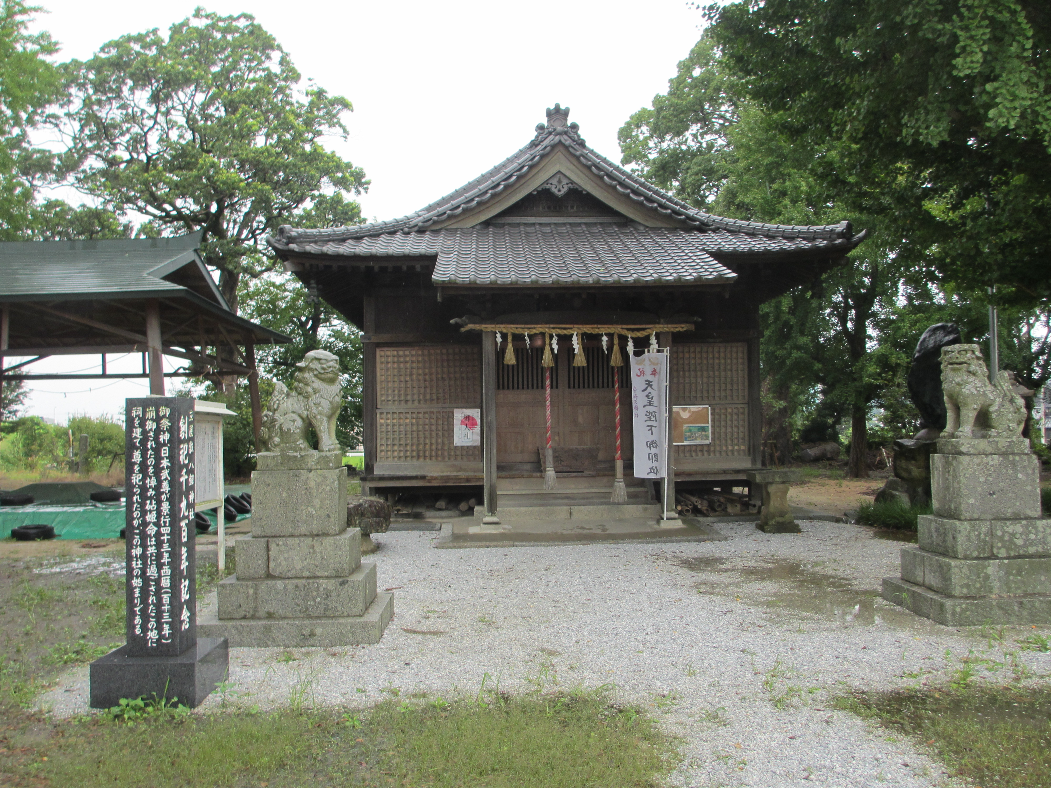 水巻駅から遠賀川73号線沿い、山鹿秀遠公壇ノ浦前戦勝祈願の狛犬奉納